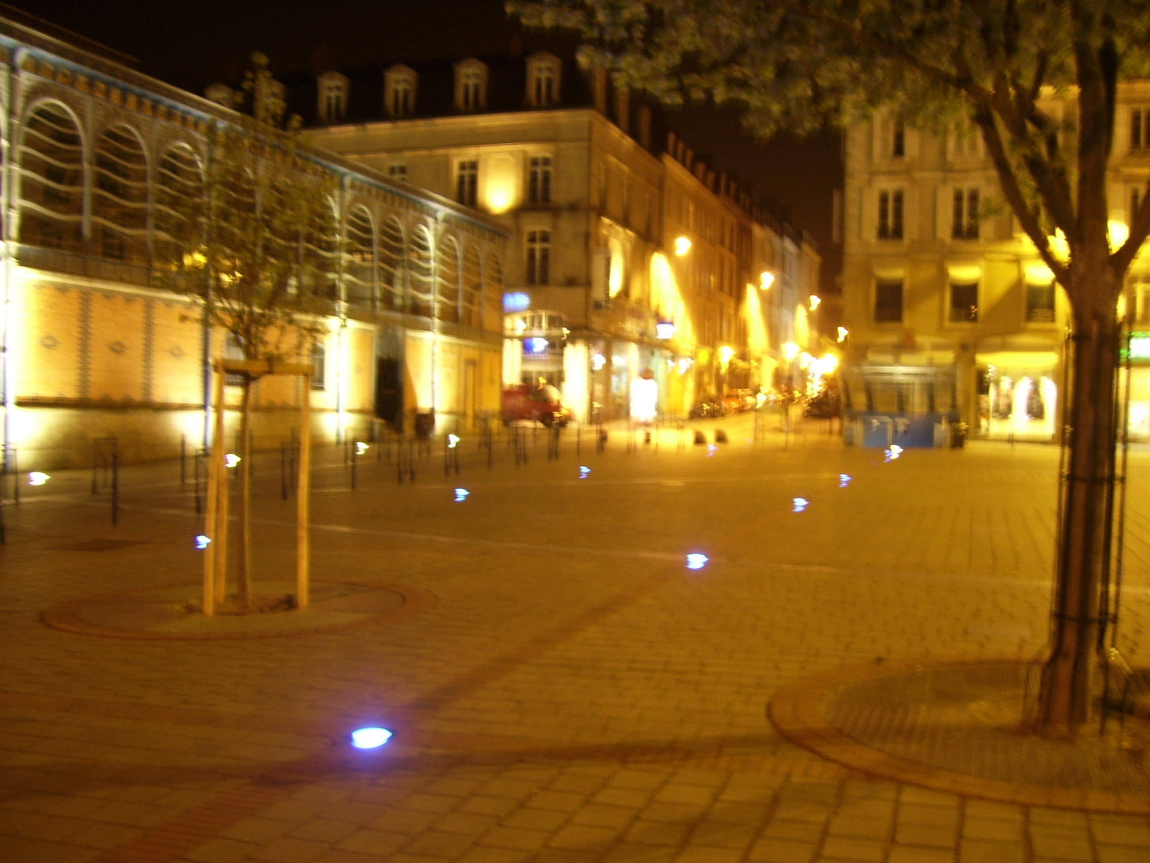 Place de la Motte, Limoges, Haute-Vienne, France